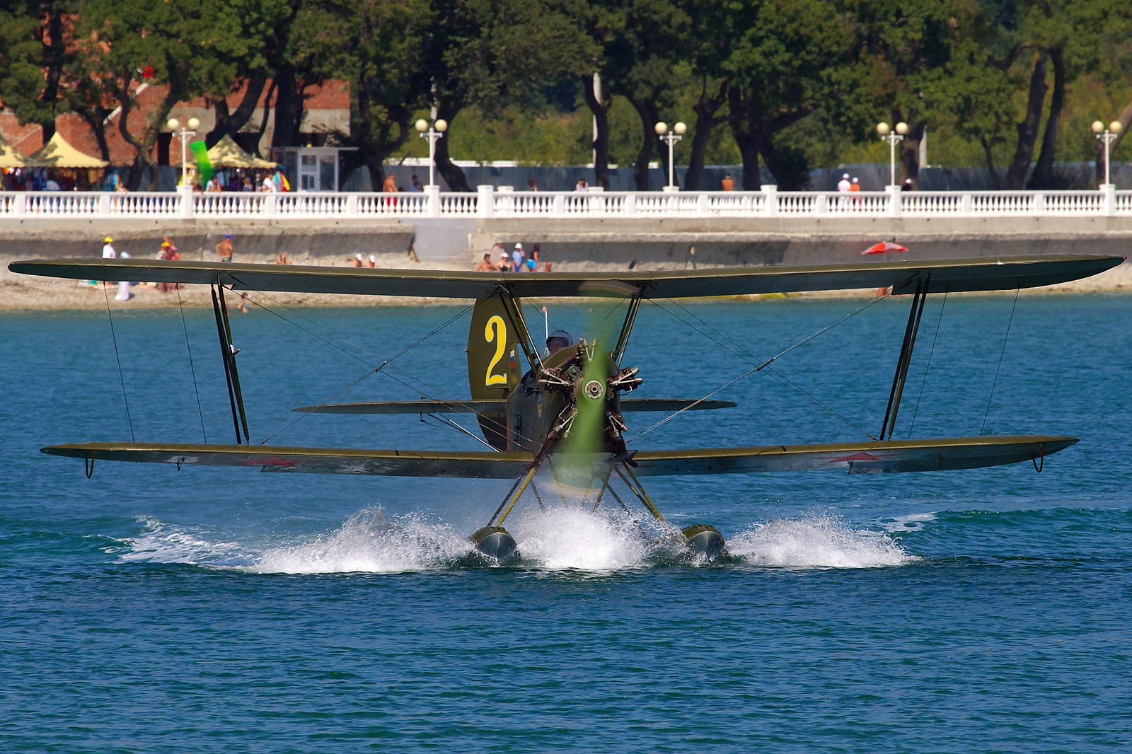 Polikarpov Po-2 Gelendzhik (GDZ / URKG) Russia, September 9, 2010 RA-0524G / 2 So nice to see this legendary biplane is not just flying but even floating :)